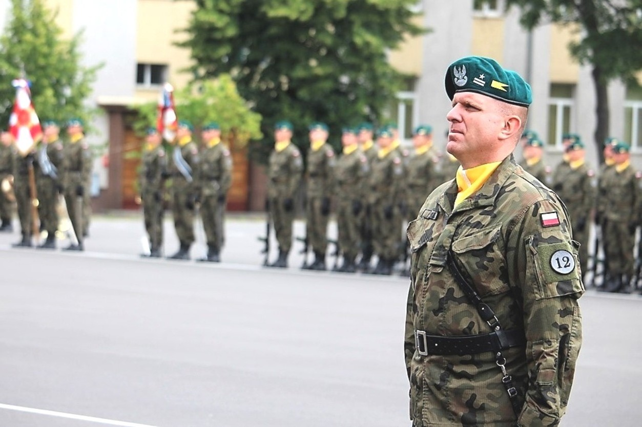 mjr Maciej Paul